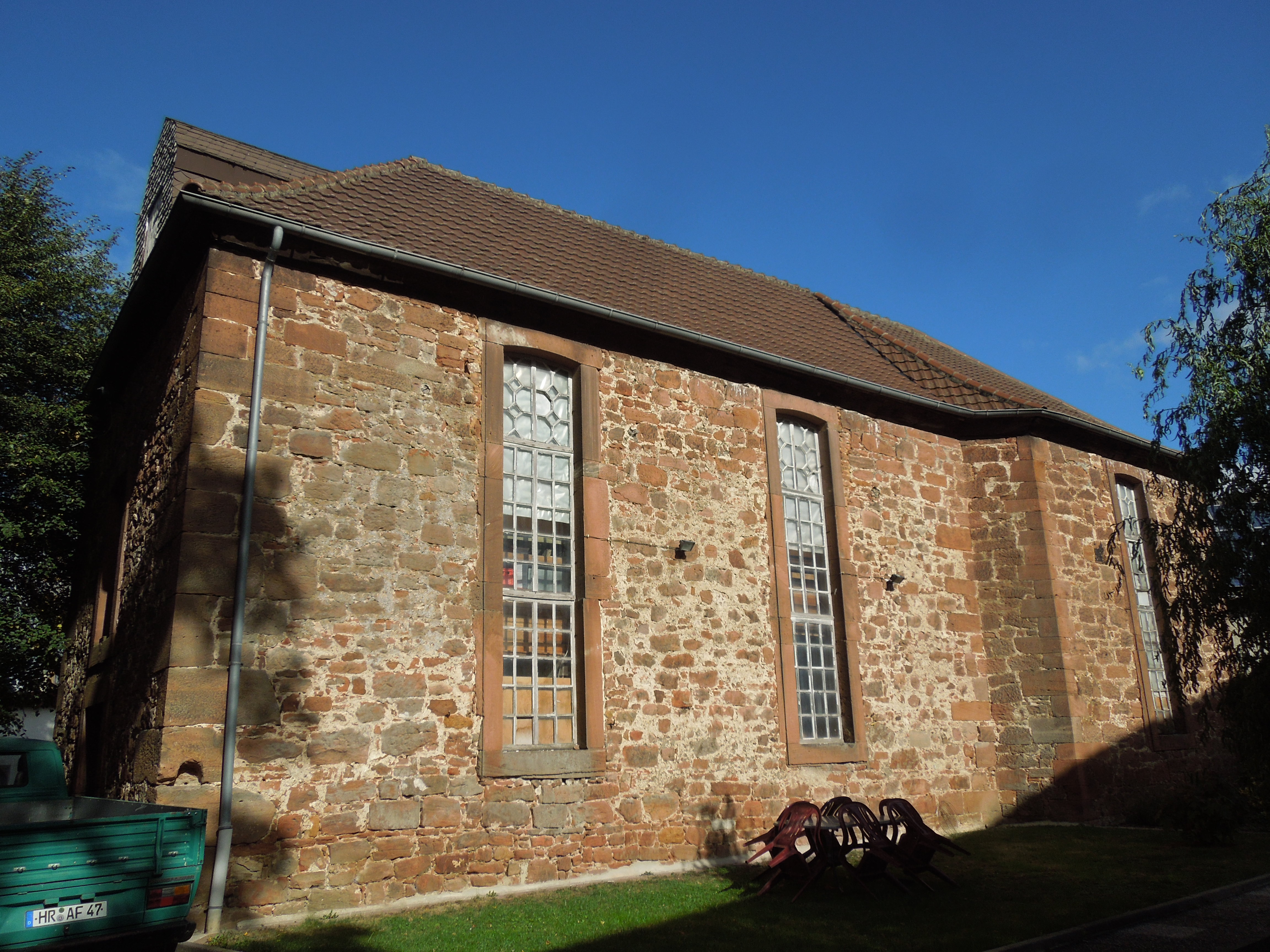 Die ehemalige Kirche in Großenenglis, heute genutzt als Lagerhaus